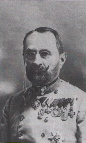 Baron Emanuel von Cveticanin